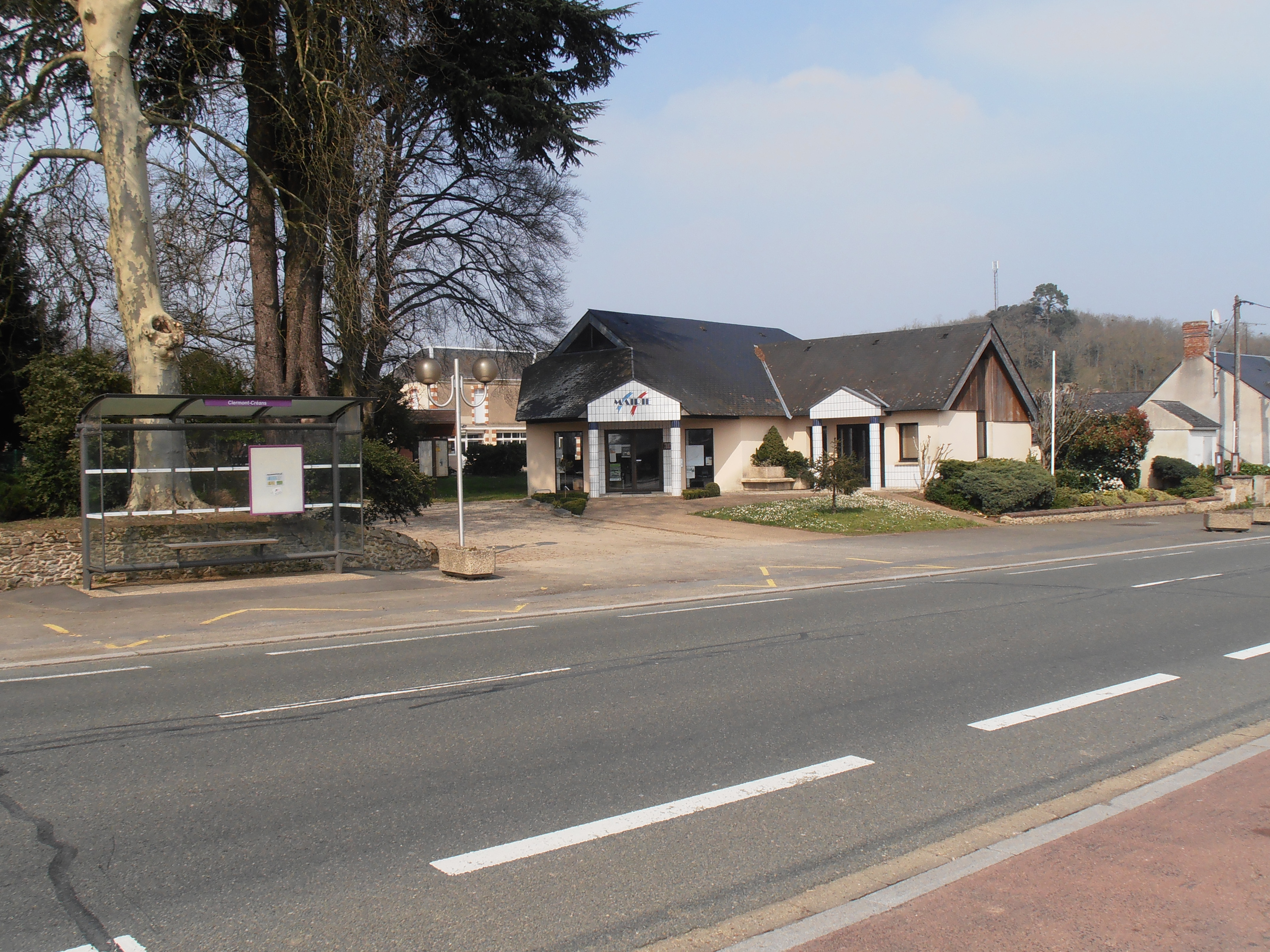 La mairie de Clermont-Créans vue de la D323